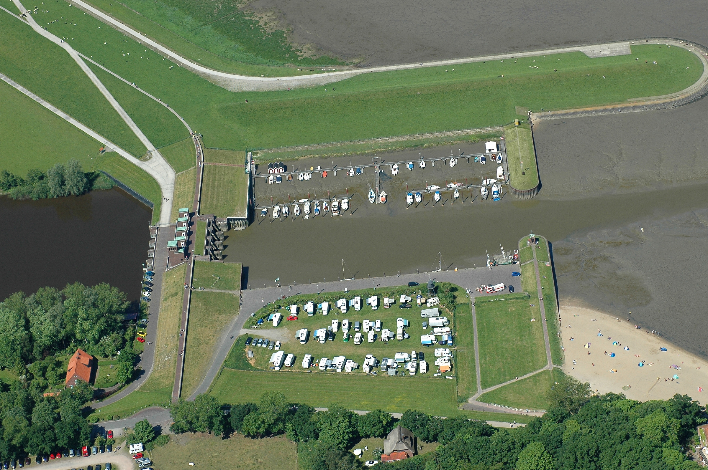 Dangaster Hafen und Siel (Fotoflug vom Flugplatz Nordholz-Spieka über Cuxhaven und Wilhelmshaven)